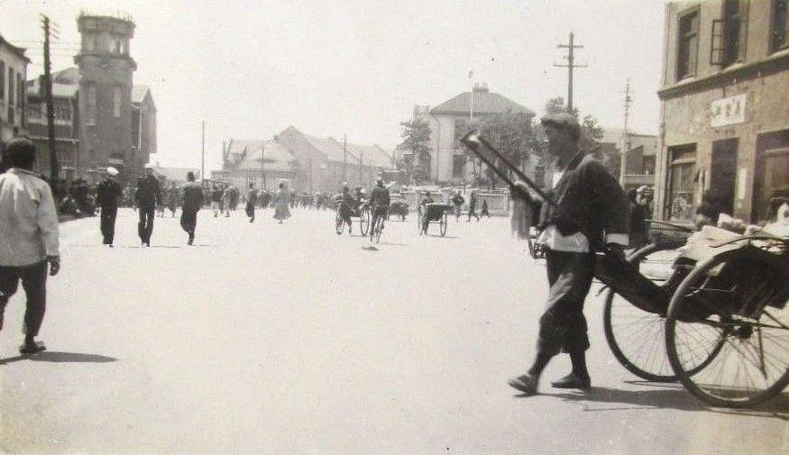 青岛小港一路冠县路路口旧影